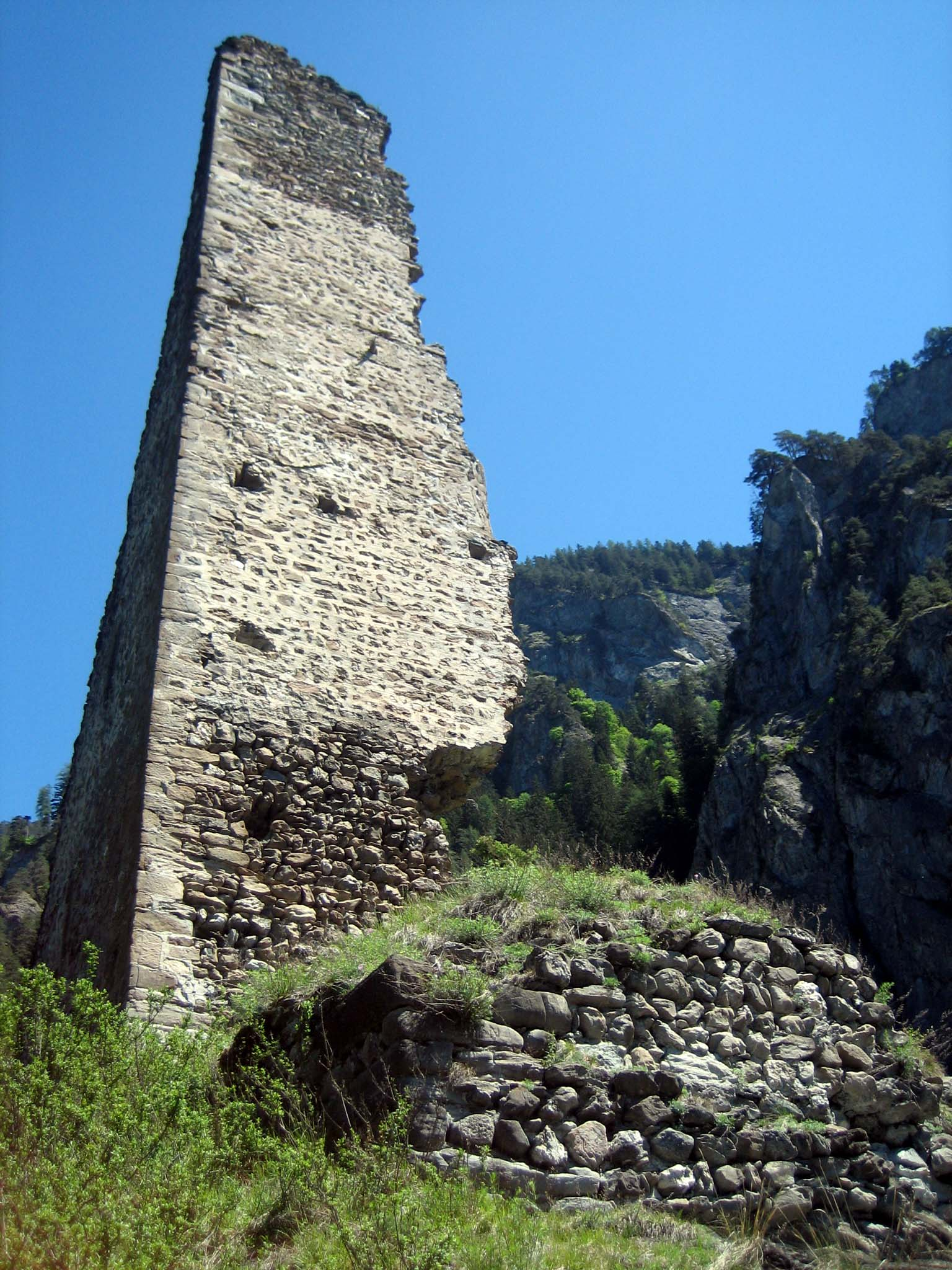 Mauerrest von unten